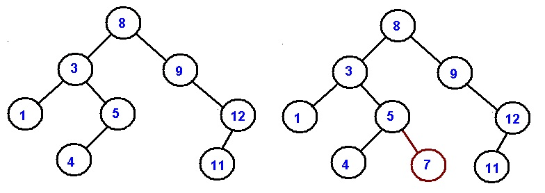 Primjer umetanja novog cvora.